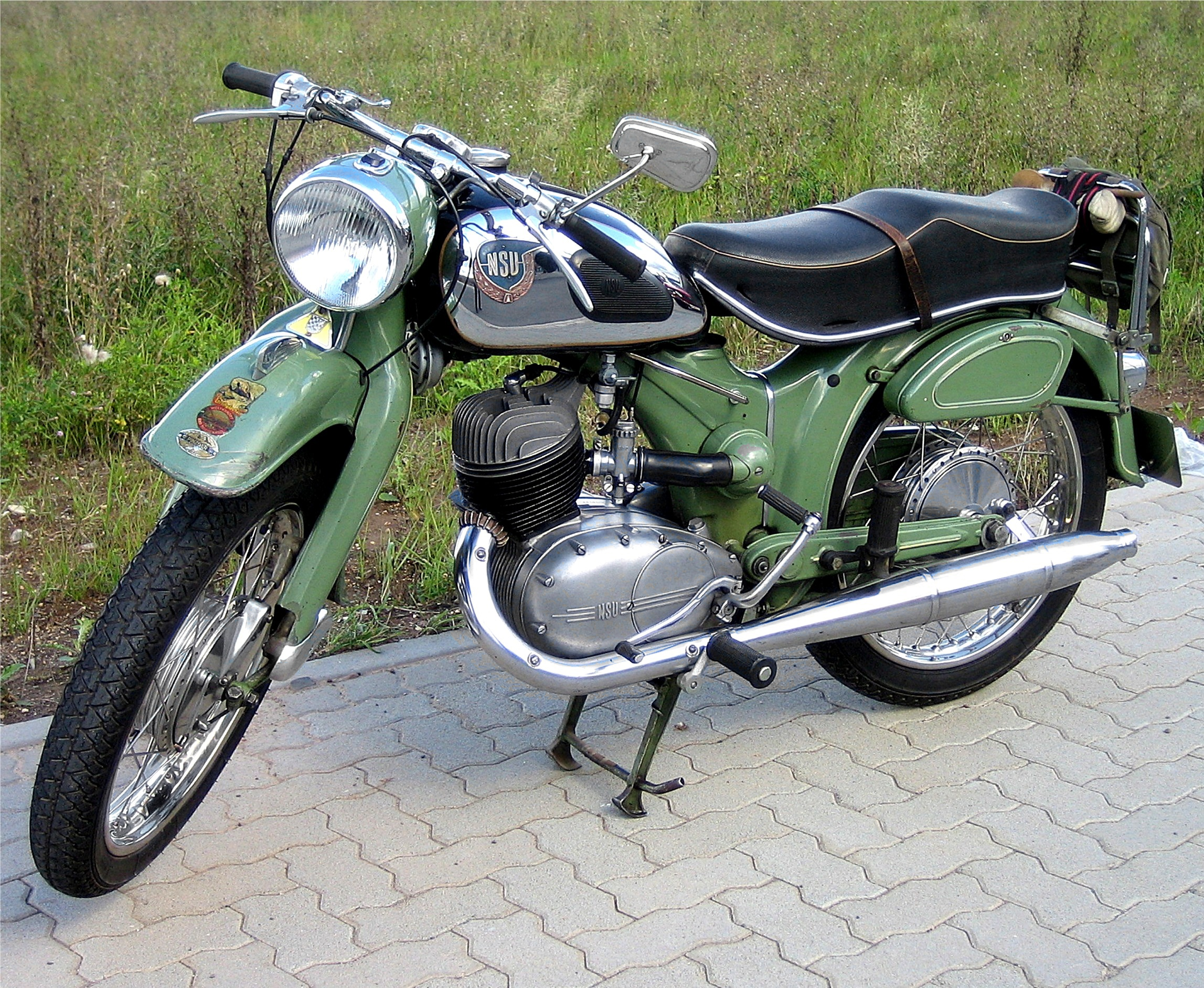 NSU Superlux, Baujahr 1955, Originalzustand, unrestauriert